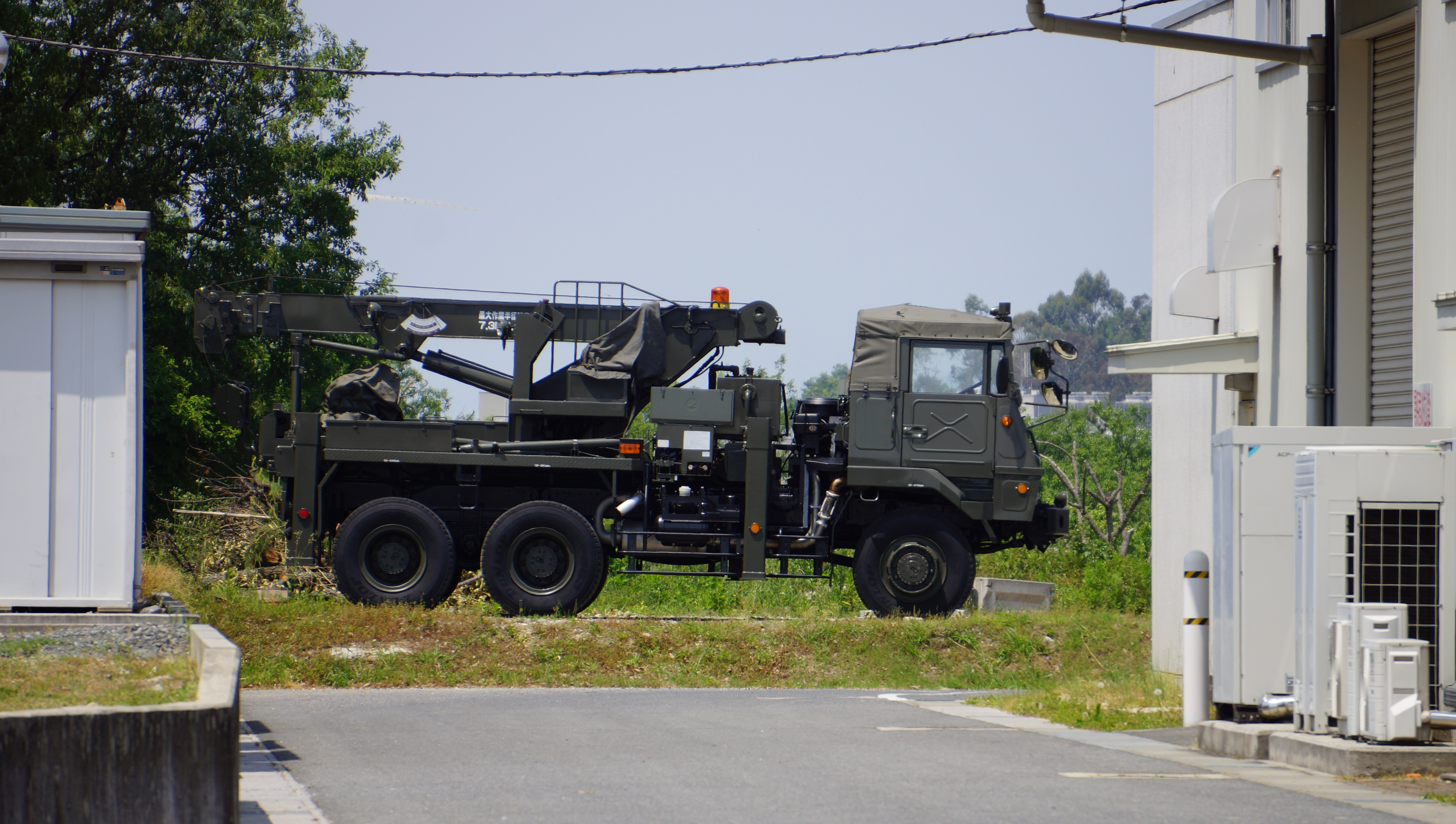 陸上自衛隊 軽レッカ。 13年5月25日 航空自衛隊奈良基地にて。